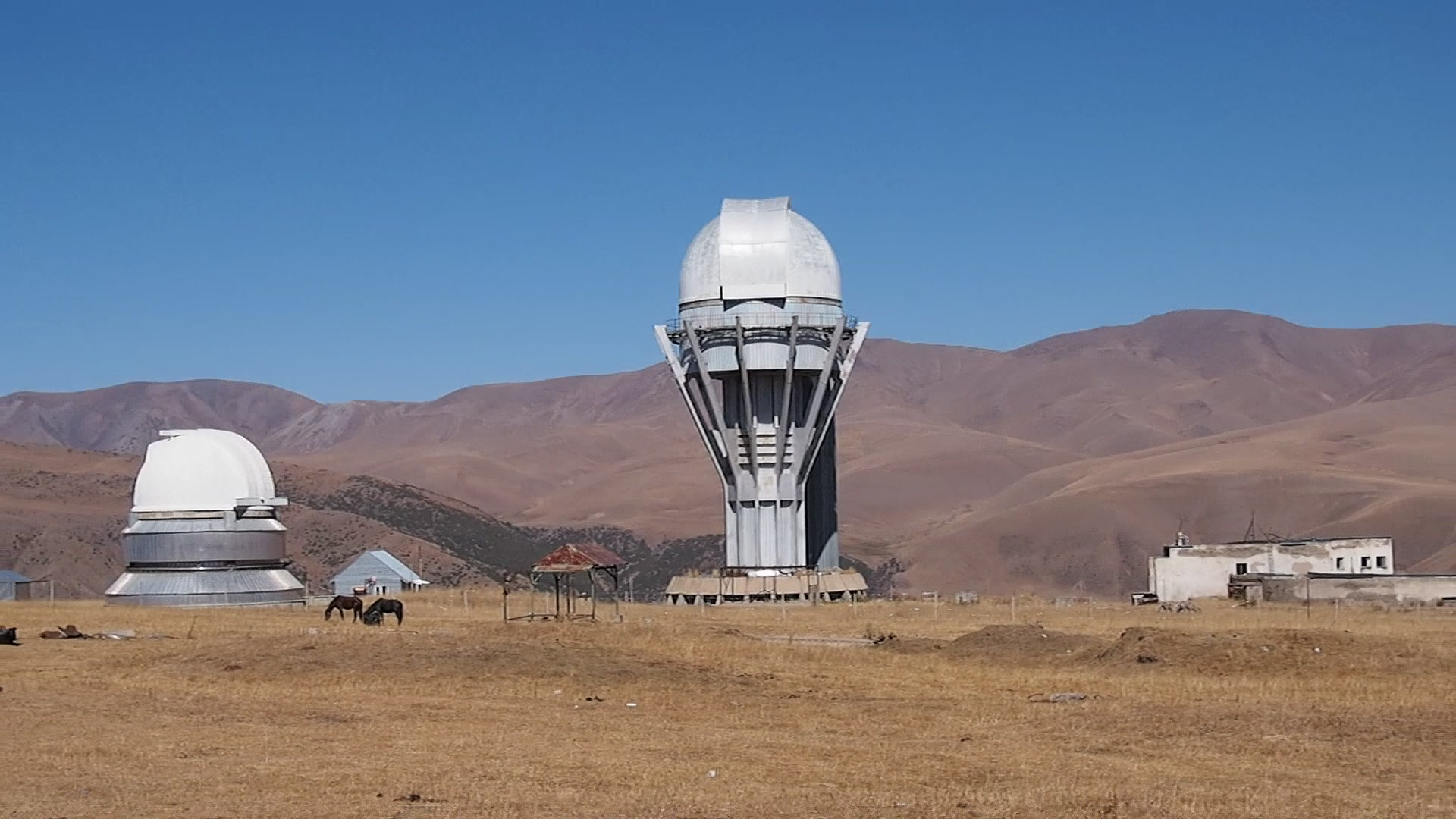 P9210669 300